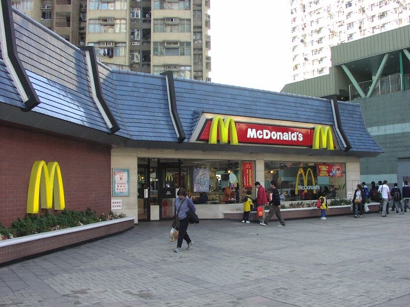 香港大埔太和麥當奴